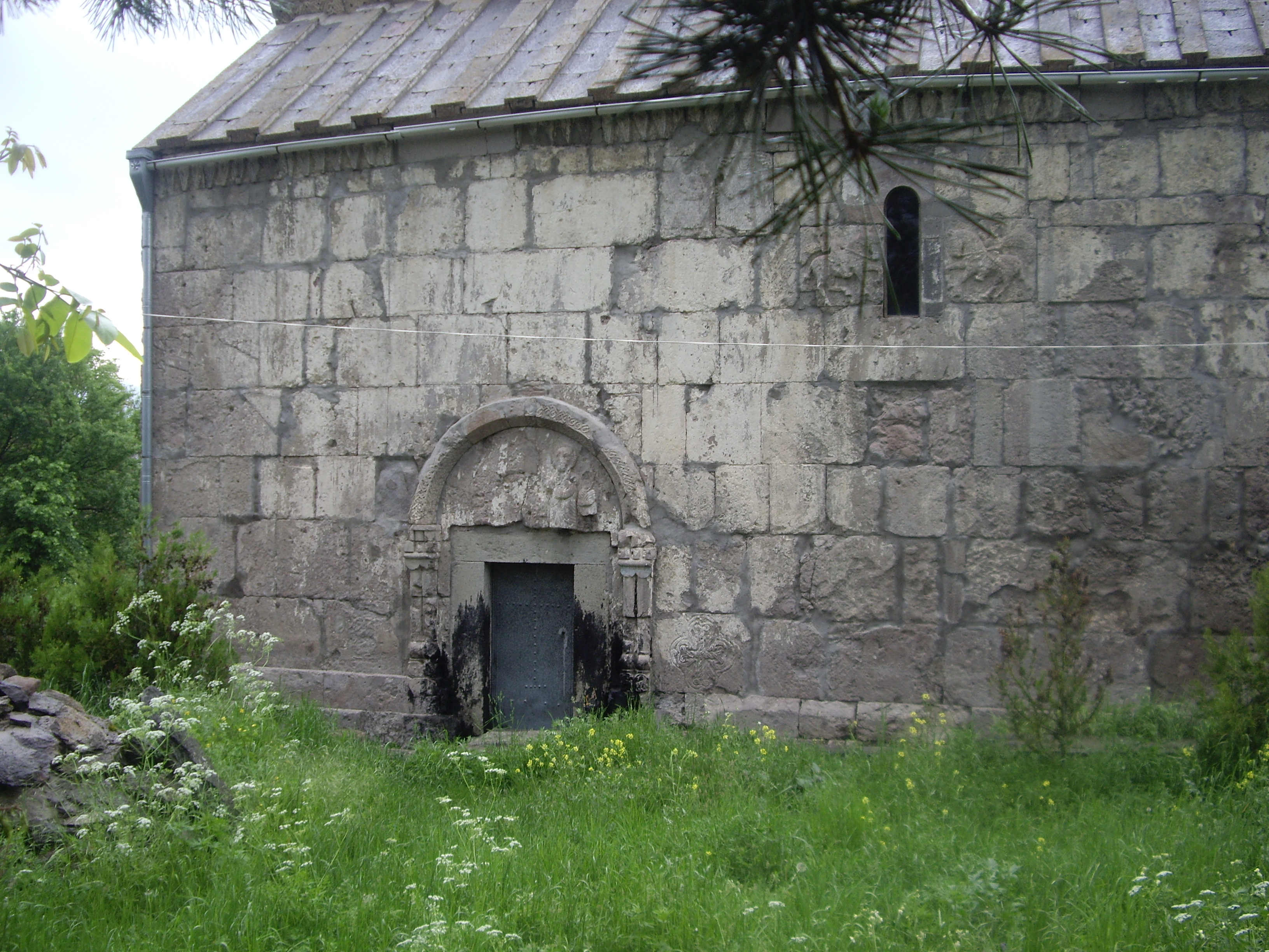 ვალეს ღვთისმშობლის ეკლესიის სამხრეთი ფასადი